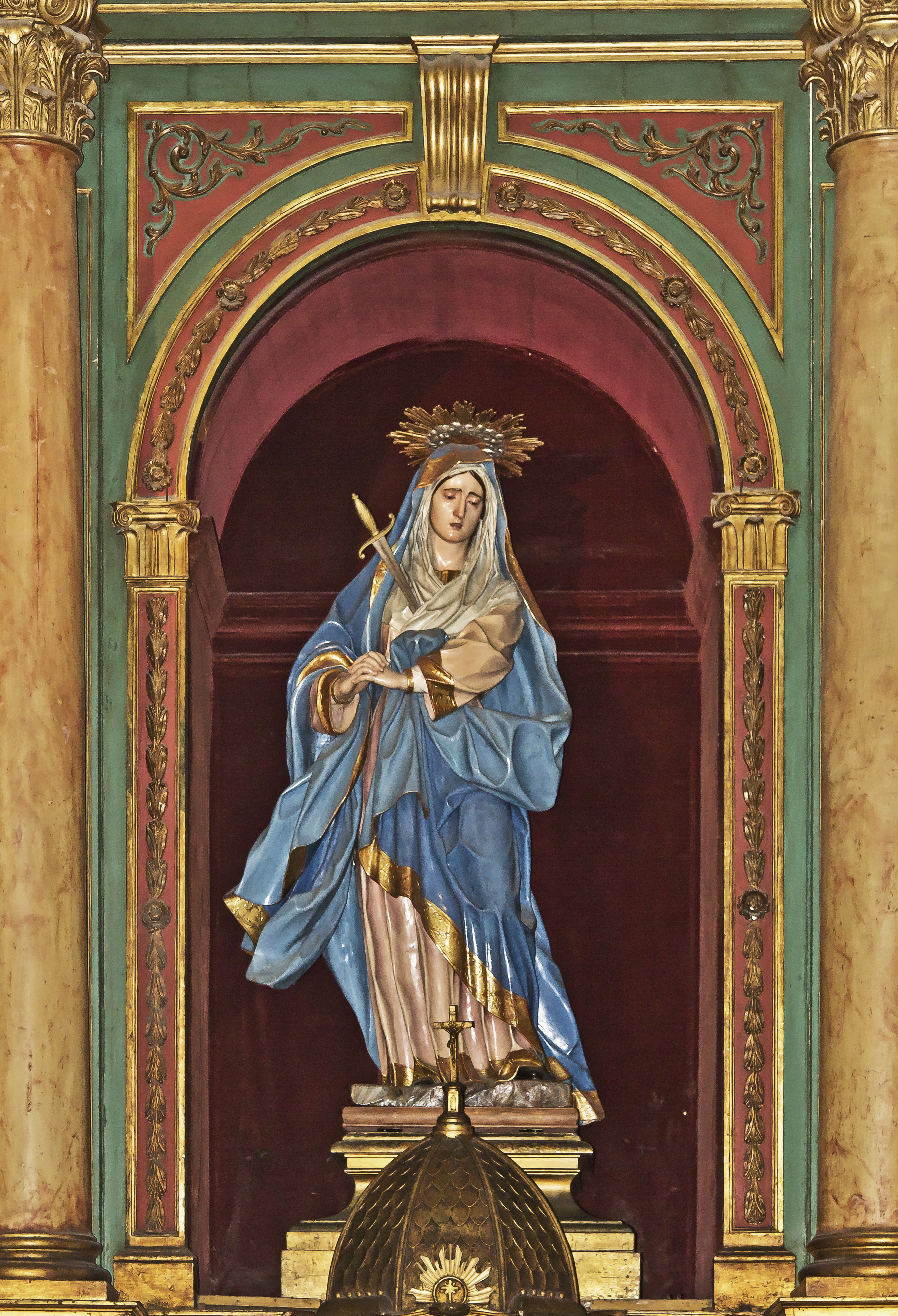 Die Figur der Dolorosa befindet sich in einem Seitenaltar der Kathedrale Santa Ana in Las Palmas de Gran Canaria